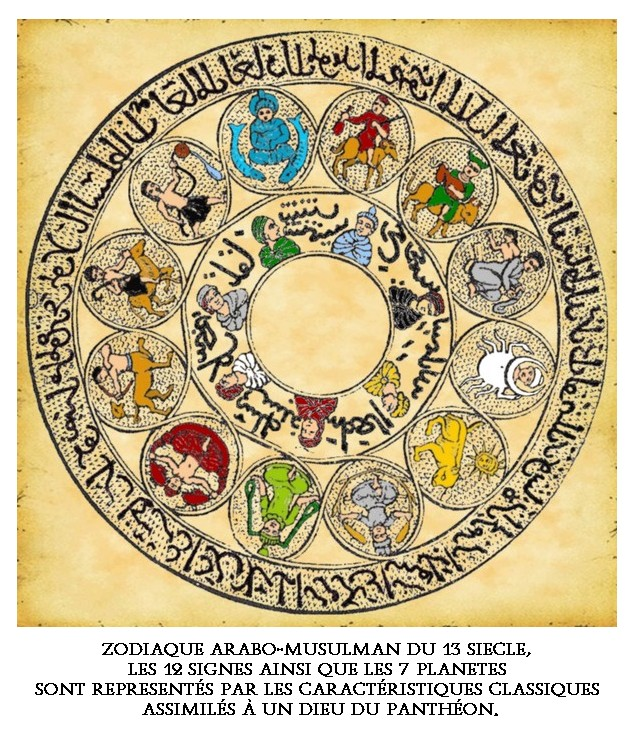 Zodiaque arabo-Musulman du 13 siècle, Les 12 Signes ainsi que les 7 planètes. sont représentes par les caractéristiques classiques assimilés à un dieu du Panthéon.